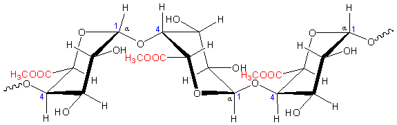 Vollständig methylierter Abschnitt eines Pektin-Moleküls - Bild selbst erstellt!